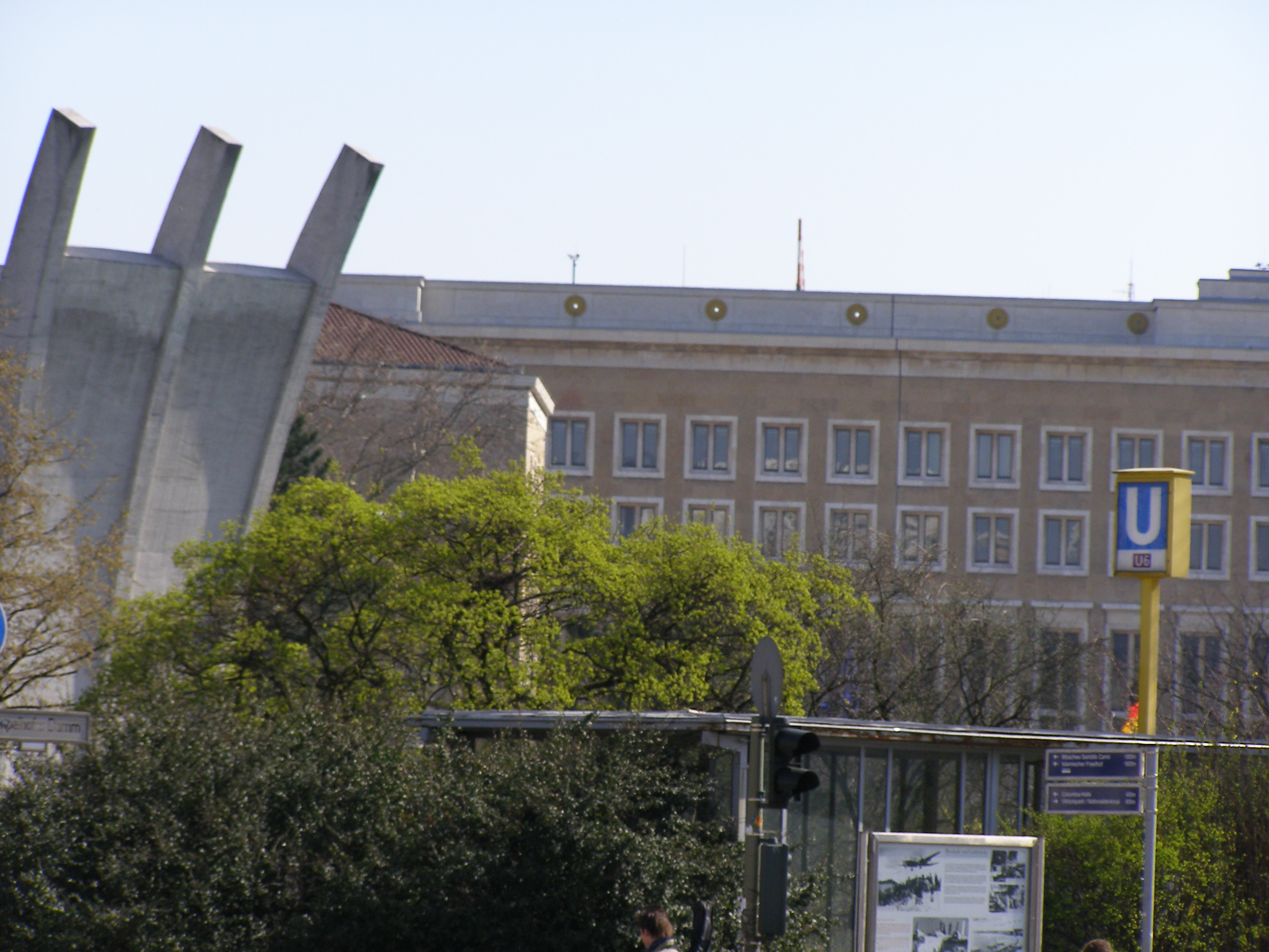 U-Bahnhof Platz der Luftbrücke, Berlin (Eingang; im Hintergrund das Flughafengebäude, links das Denkmal der Luftbrücke) underground station Platz der Luftbrücke, Berlin (in the background the airport building, left the memorial to the air lift of Berlin)